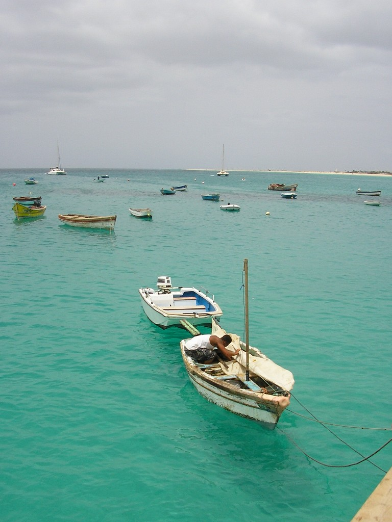 Santa Maria, Sal island, Cape Verde